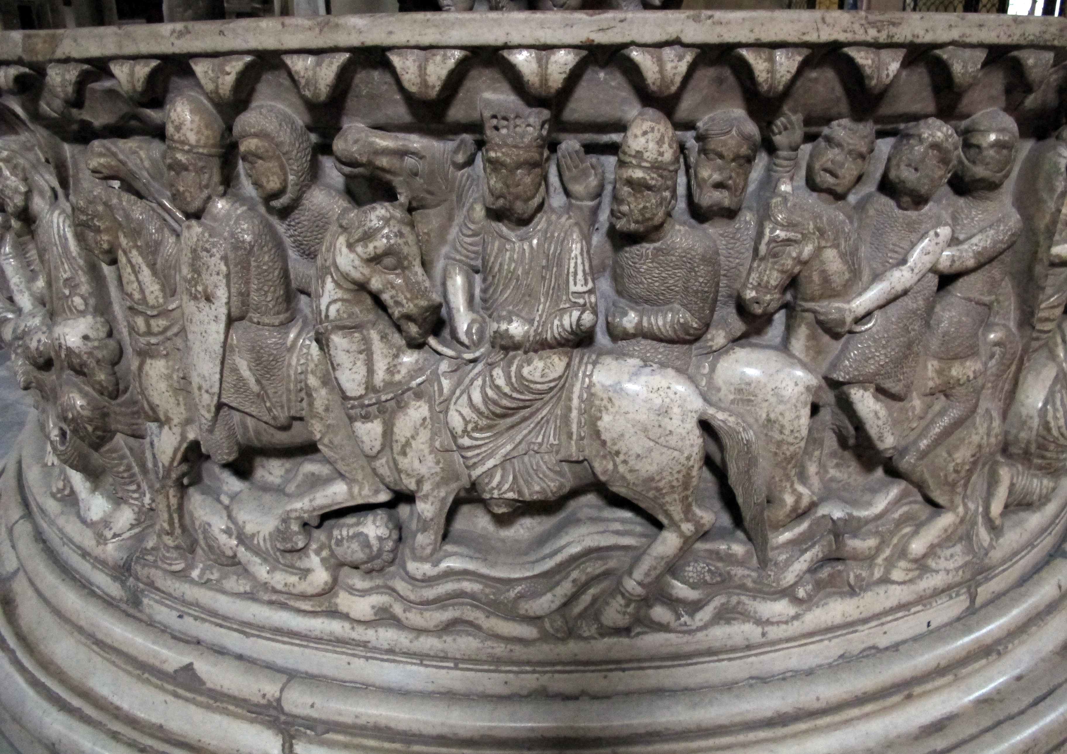 San Frediano (Lucca)